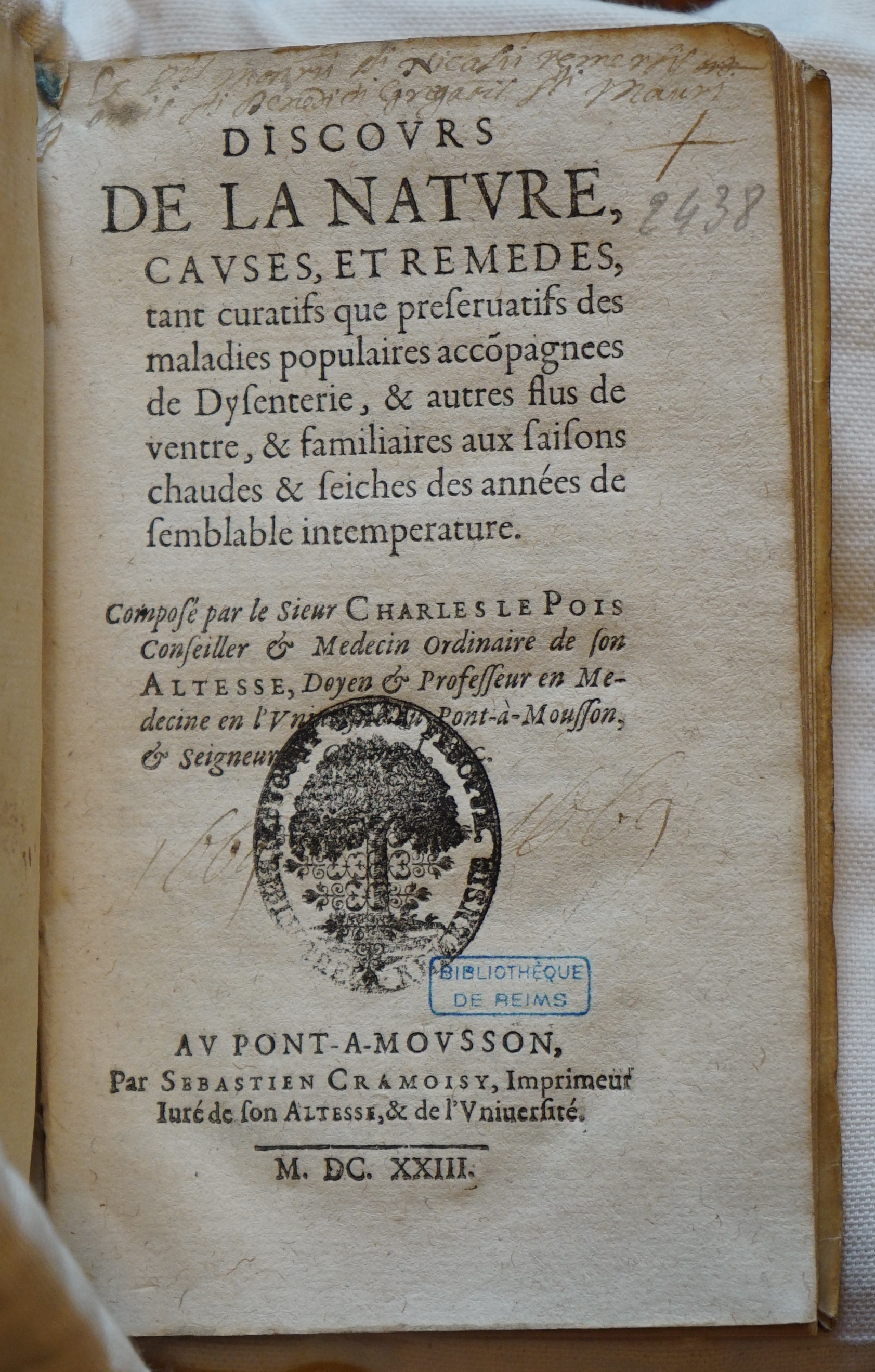 détail du livre avec tampons.